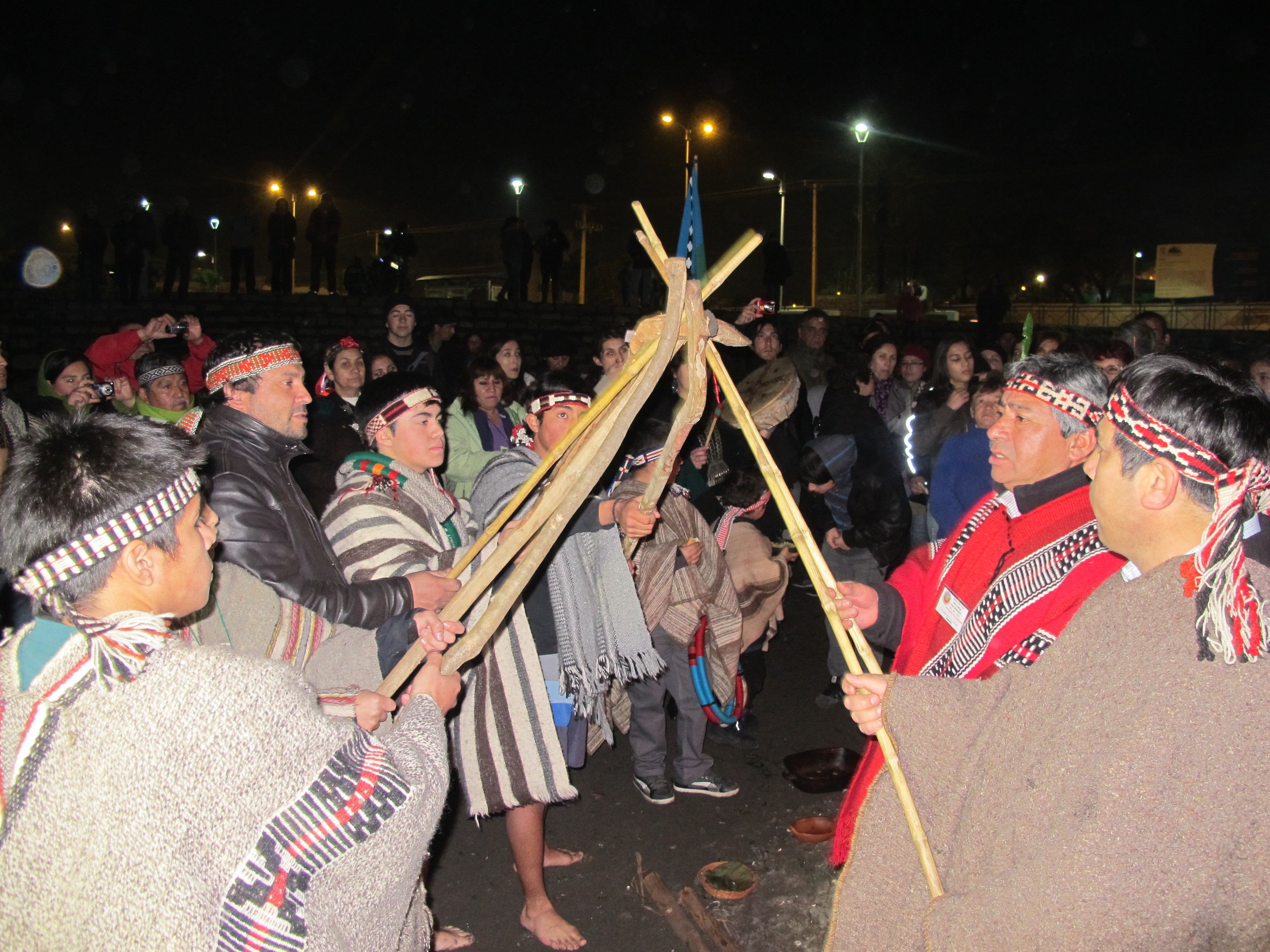 Alcalde de Talcahuano se sumó a celebración de We Tripantu, año nuevo mapuche